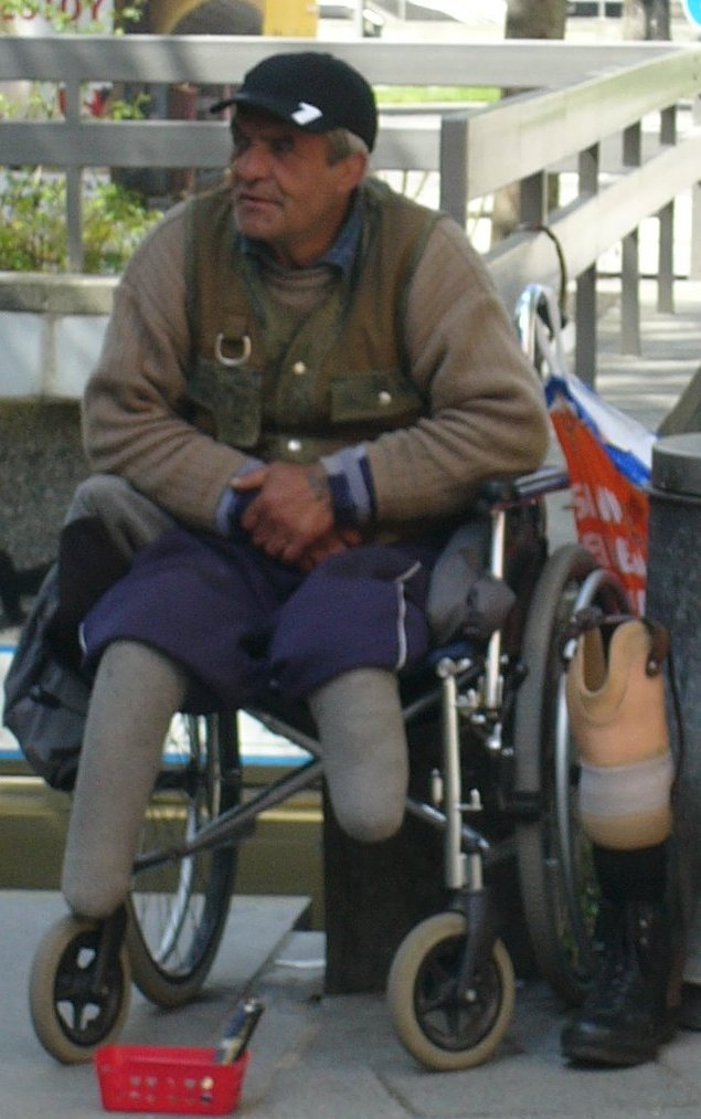 A beggar